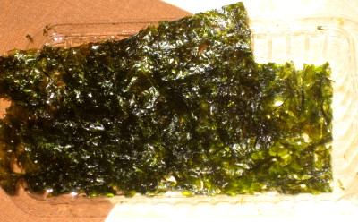 Barquette de yakinori Photo personnelle prise en novembre 2005